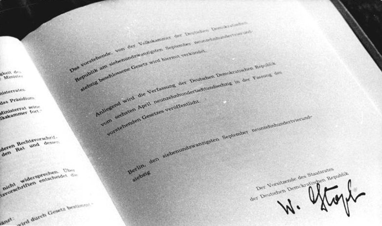 ADN-ZB Spremberg 30.9.74-Berlin: Gesetz zur Ergänzung und Änderung der Verfassung der DDR vom 7.10.1974, verkündet am 27.9.74 durch den Vorsitzenden des Staatsrates, Willi Stoph.